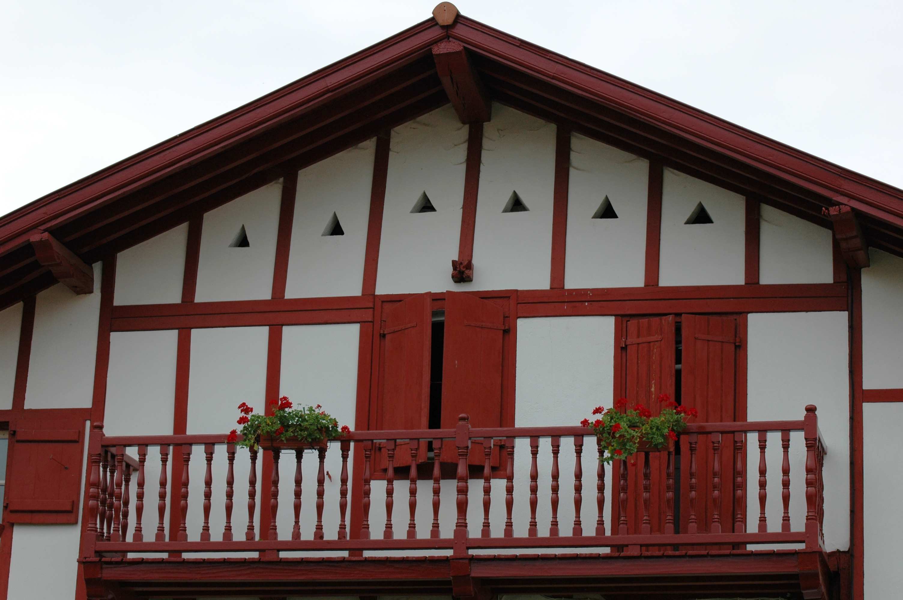 Armendarits, maison de Basse-Navarre